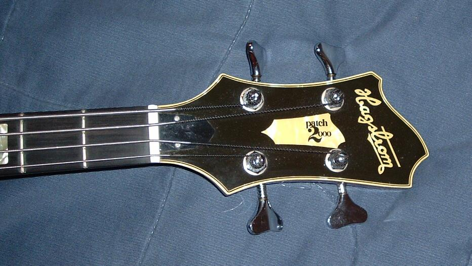 Hagstom Bass Detail #1